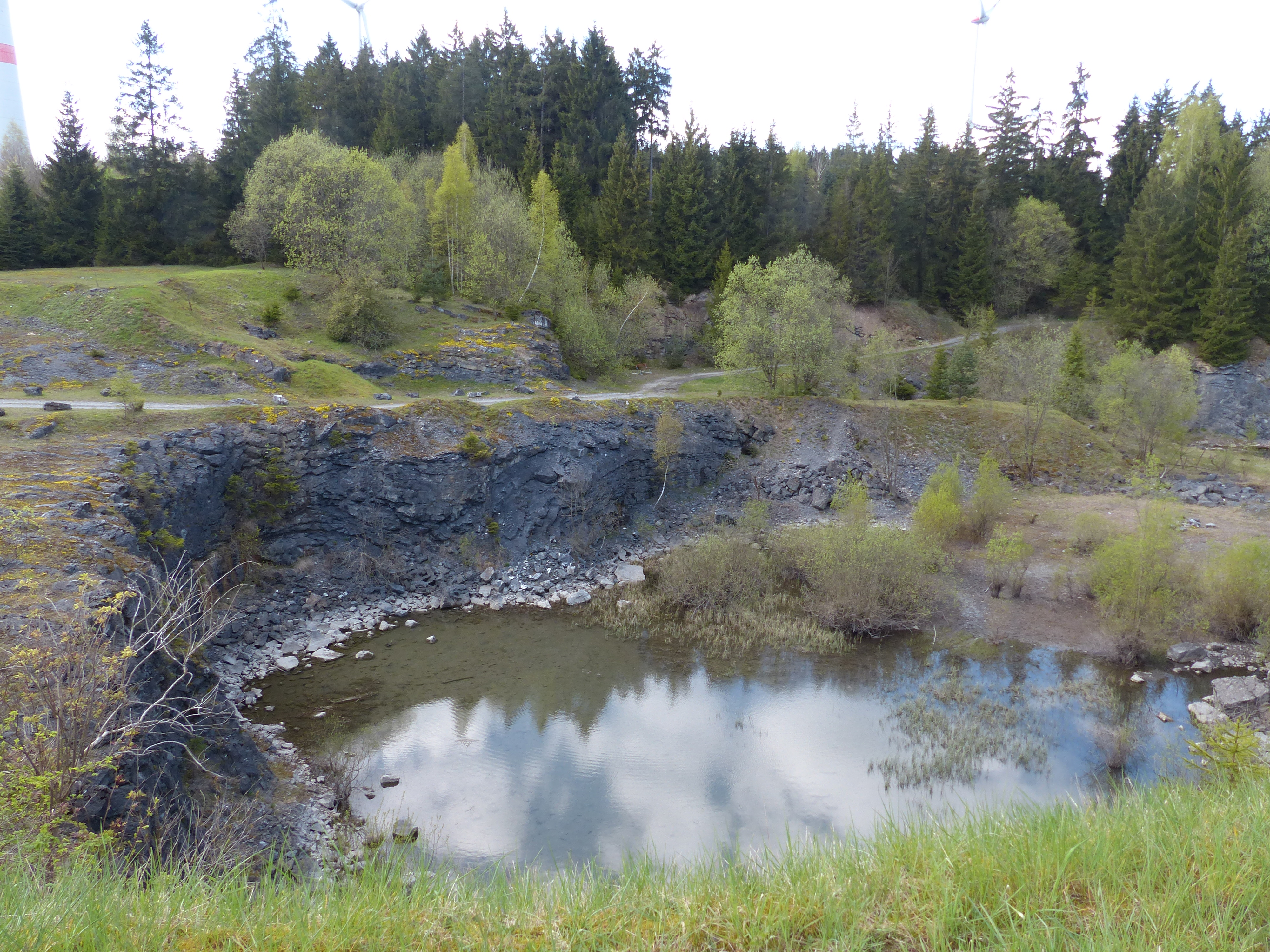 Ehemaliger Kohlenkalkbruch NW von Trogenau, Geotop 475A025